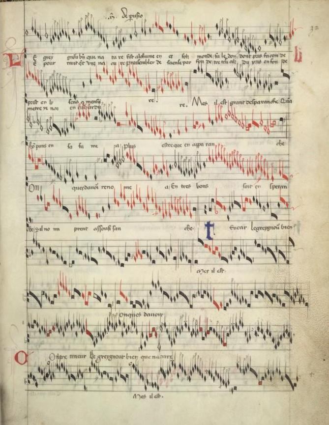 Manuscrit de Modène